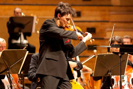 Сергей Малов, скрипач и альтист